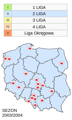 Jagiellonia Białystok w sezonie 2003/2004 -mapka